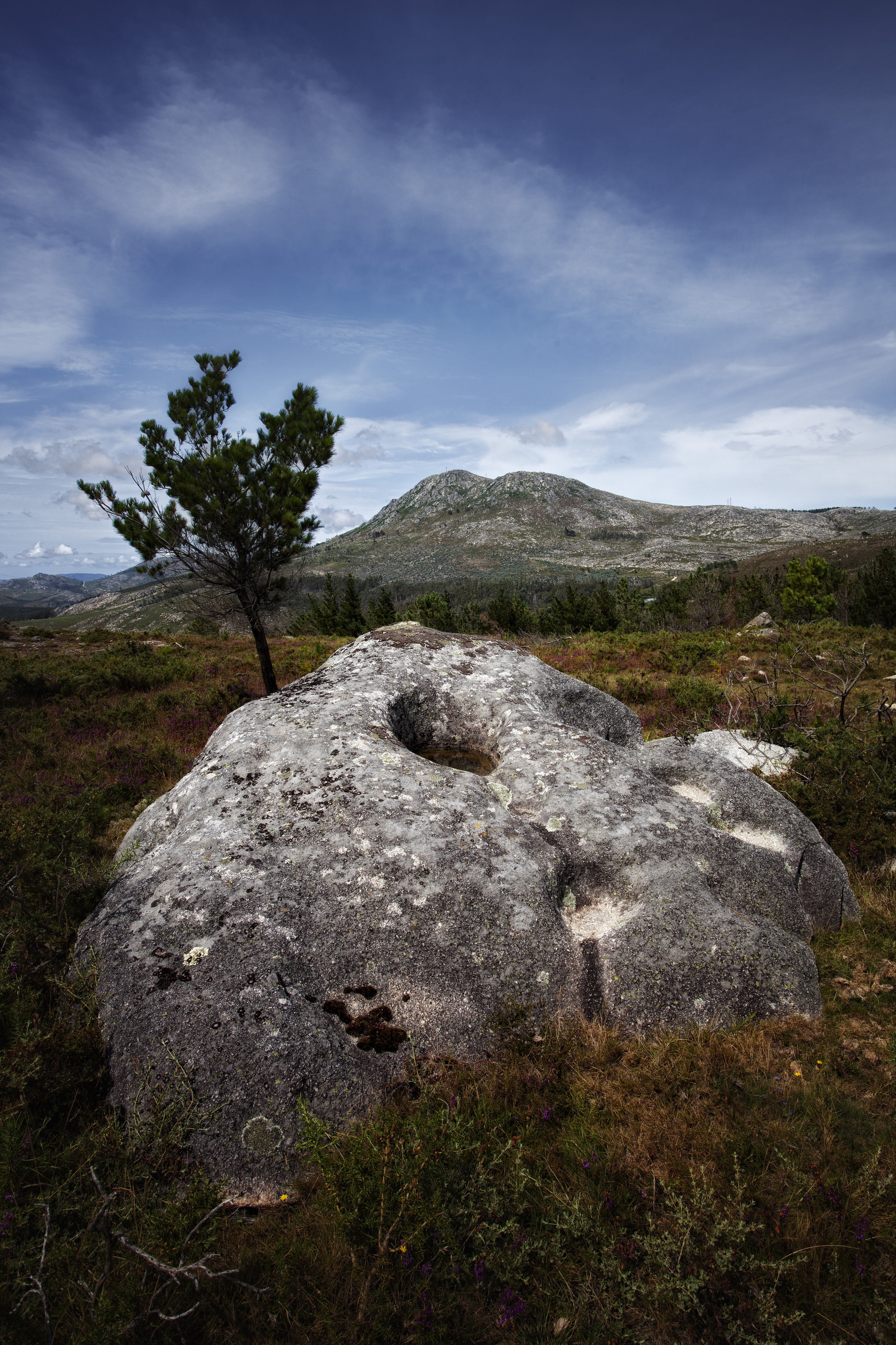 Pía megalítica da necrópole de Moldes